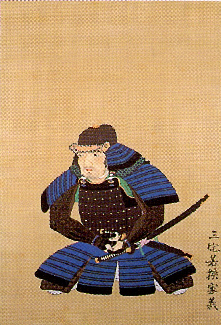 三宅家義の肖像。